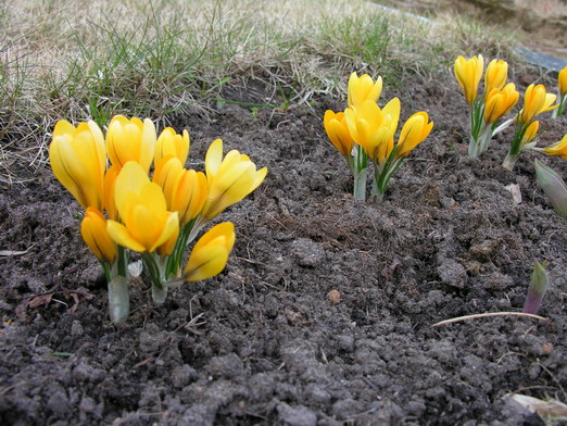 Geltonasis krokas (Crocus flavus) Šeima. Vilkdalginiai (Iridaceae) Foto: Algirdas, 2006 m. balandžio 21 d.